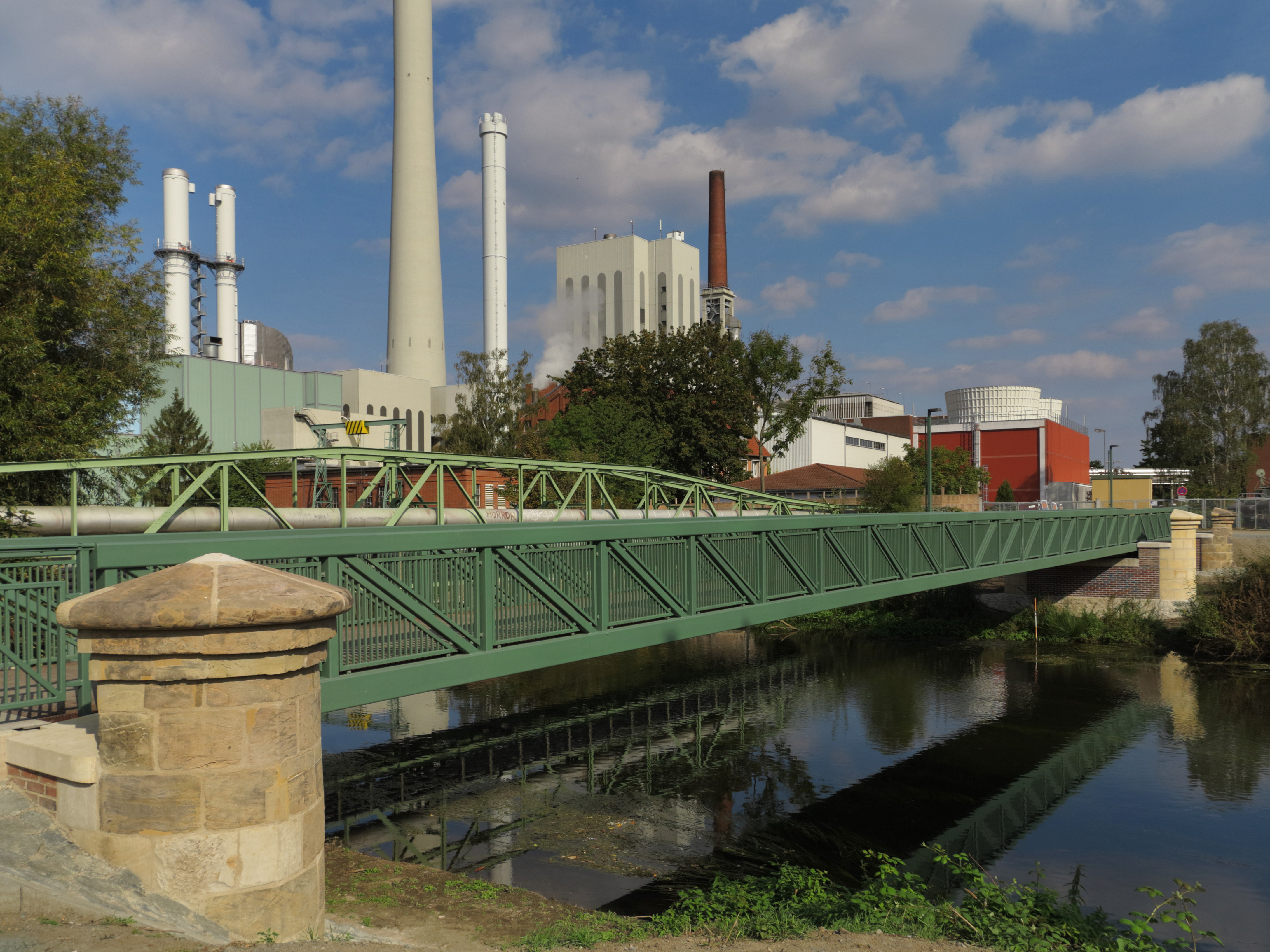 Braunschweig: die 54 Meter lange Stahlfachwerkbrücke, die im Verlauf des Braunschweiger Ringgleises die Oker überquert. Die Fußgängerbrücke hat eine begehbare Breite von 3 Metern. Sie wurde am 19. September 2016 eröffnet und hat 850000 Euro gekostet.